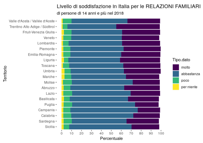 File realizzato con RStudio con dati Istat